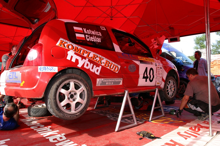 Rajd Wisły 2006, Renault Clio załogi Zbigniew Cieślar / Marek Kotwica